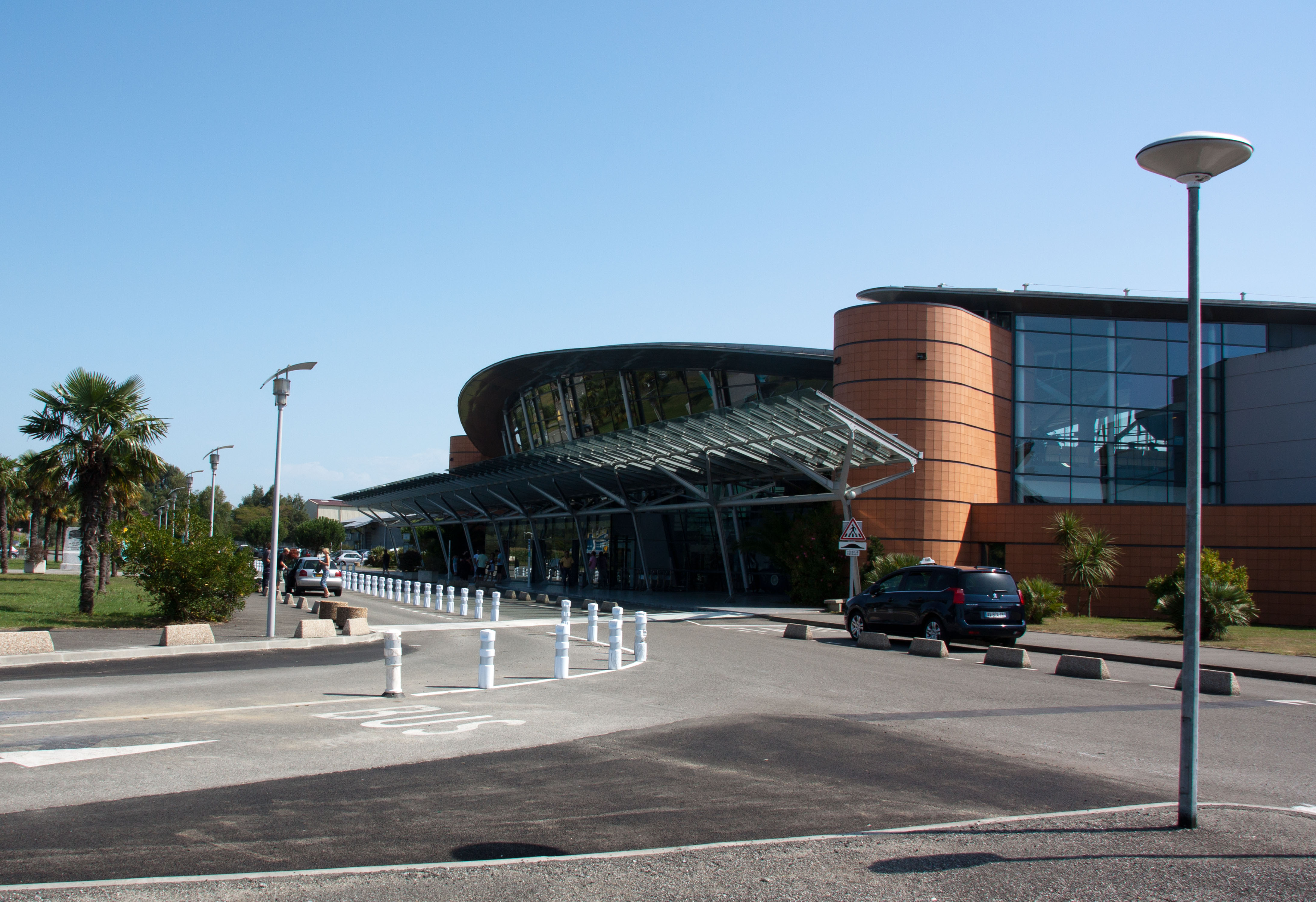 Aéroport de Pau-Pyrénées, Pyrénées-Atlantiques, France / Vue de l'aérogare depuis la voirie